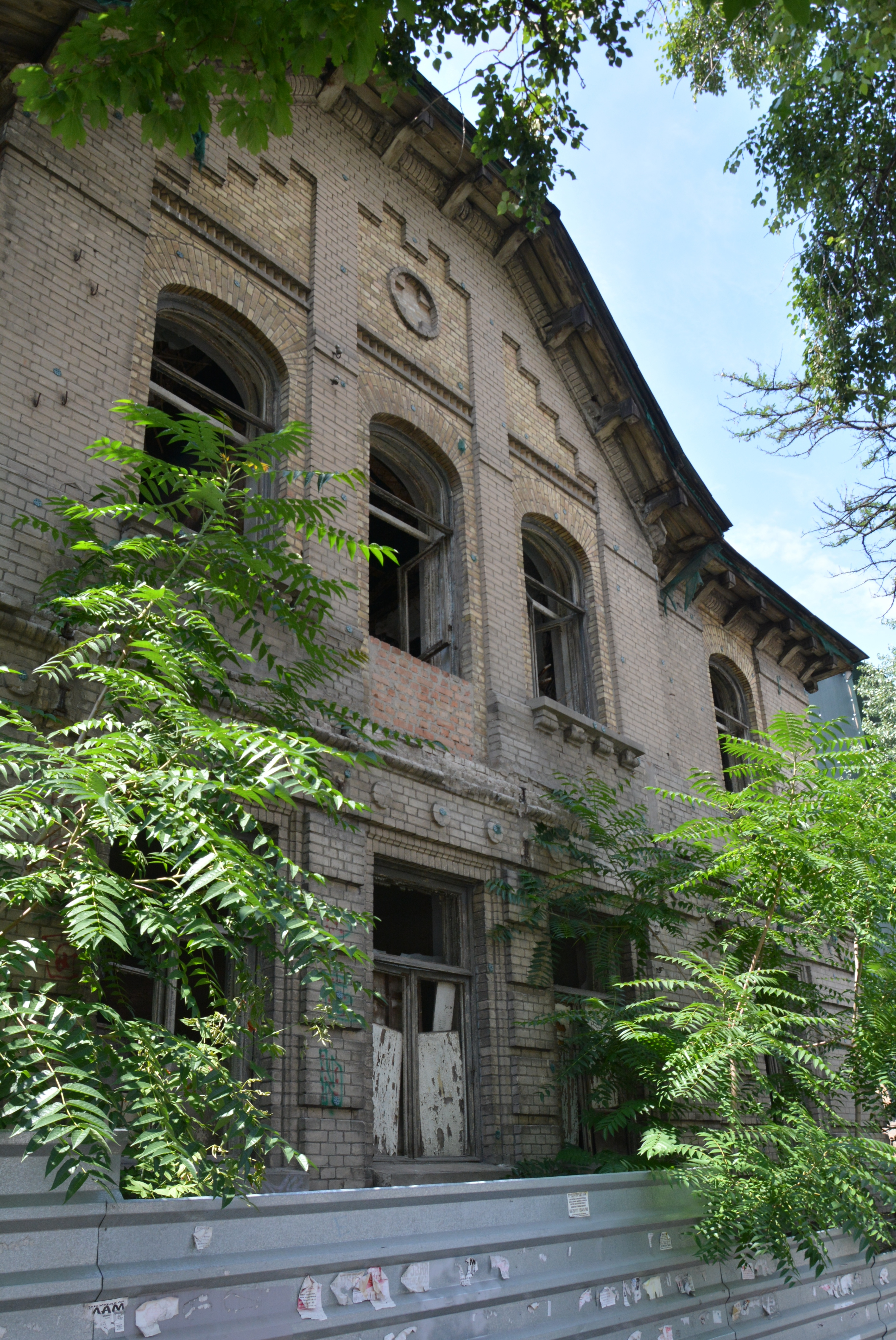 Лікарня Червоного Хреста, Дніпропетровськ, Короленка вул., 22/1